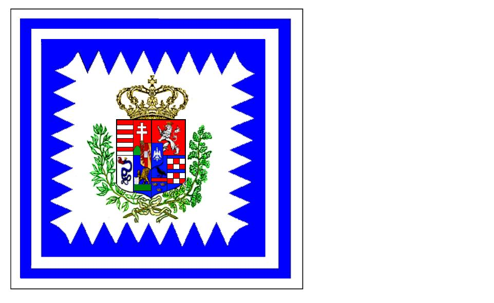 Bandiera della R.D.Brigata Estense (rielaborazione a colori) delle tavole VII ed VII pubblicate sul giornale della R.D. Brigata Estense. Le bandiere erano 2, la prima in dotazione al I° Battaglione di Linea donata da S.A.R. la Duchessa Maria Beatrice nell'anno 1820, la seconda in dotazione al II° Battaglione di Linea donata da S.A.R. la Duchessa Adelgonda nell'anno 1849. Le bandiere furono ritirate da S.A.R. il Duca di Modena Francesco V all'atto dello scioglimento della Brigata avvenuto a Cartigliano Veneto il 24 settembre 1863.